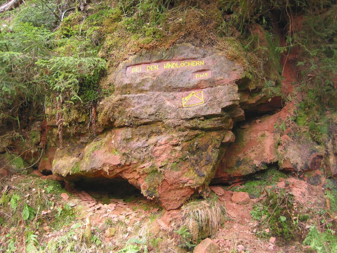 Ritterstein Nummer 88, Bei den Windlöchern